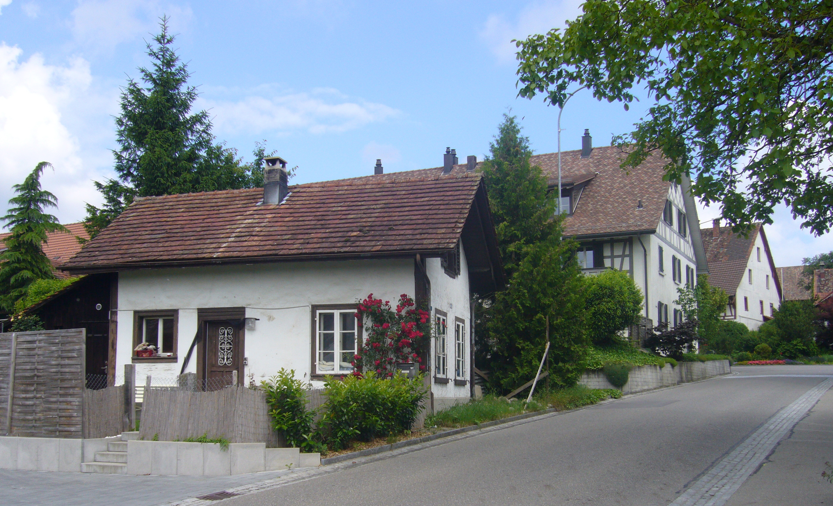 Häuser im Dorfkern von Brütten.